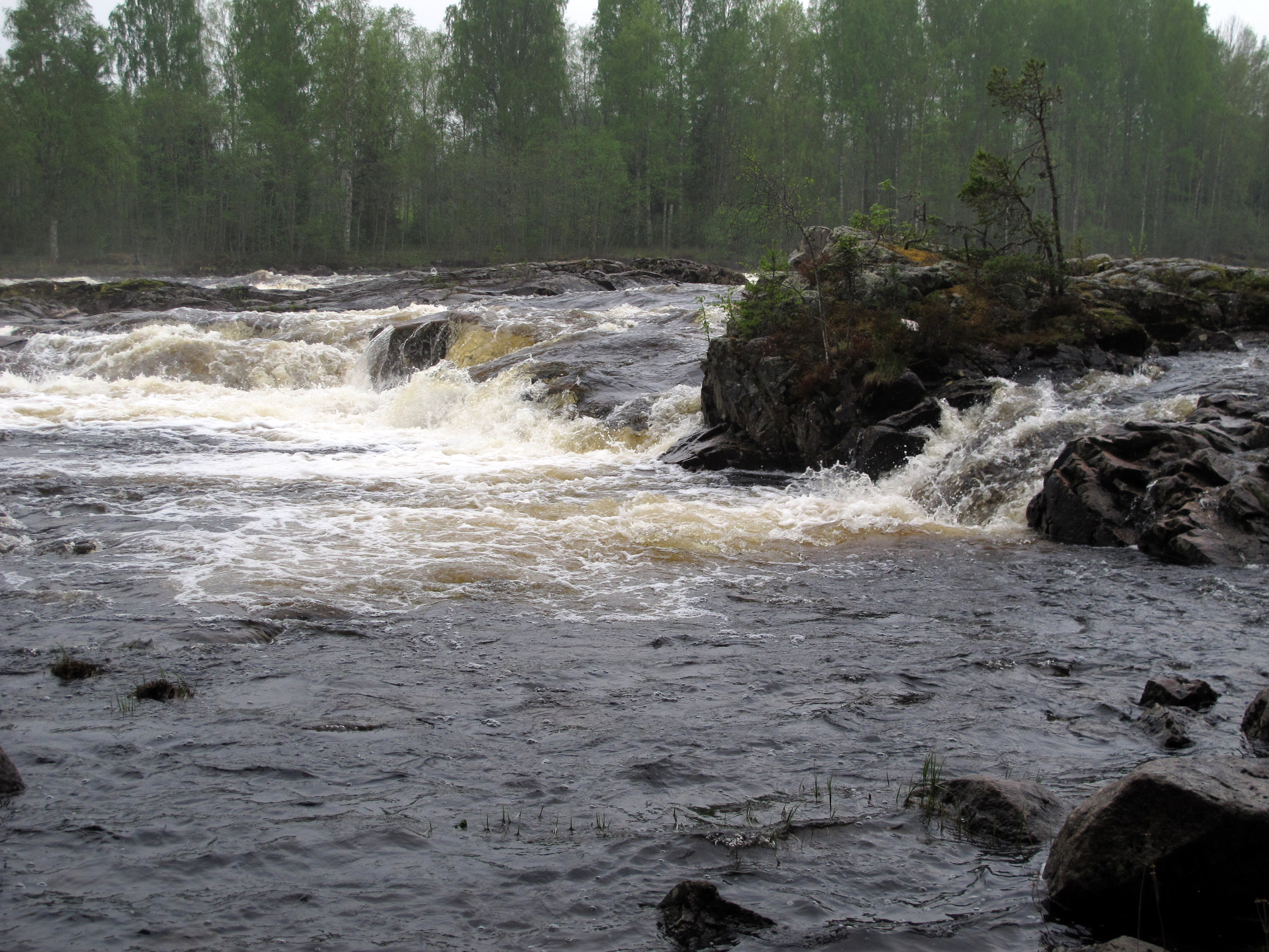 Fänforsen